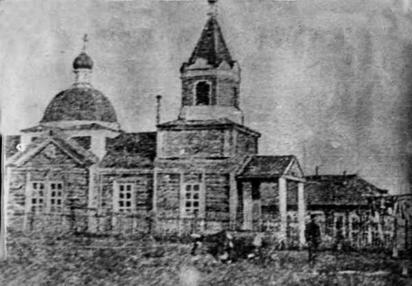 A Church in Gizhiginsk